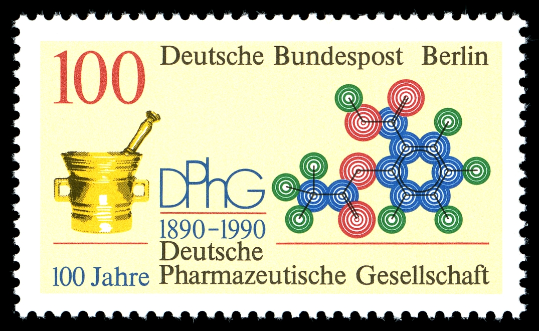 Briefmarke mit dem Wertzeichen „100“ zeigt das Textlogo der Deutschen Pharmazeutischen Gesellschaft, einen goldenen Mörser und die Strukturformel von ASS in einer Art Kugel-Stab-Modell. Ausgabepreis: 100 Pfennig First Day of Issue / Erstausgabetag: 9. August 1990 Auflage: 8.150.000 Entwurf: Ertle Druckverfahren: Offsetdruck Michel-Katalog-Nr: Ländercode-MiNr: 875